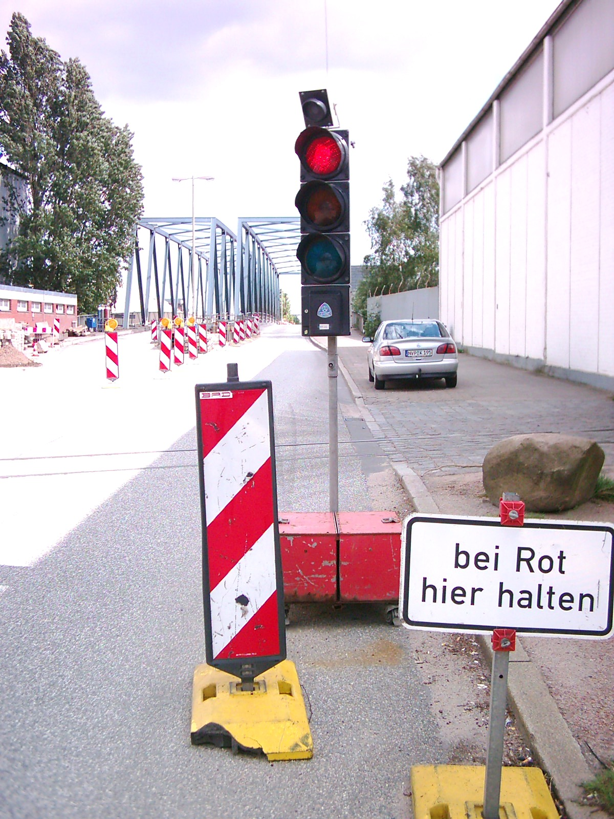 Temporäre Ampel mit Sensor (oben). Hamburg.